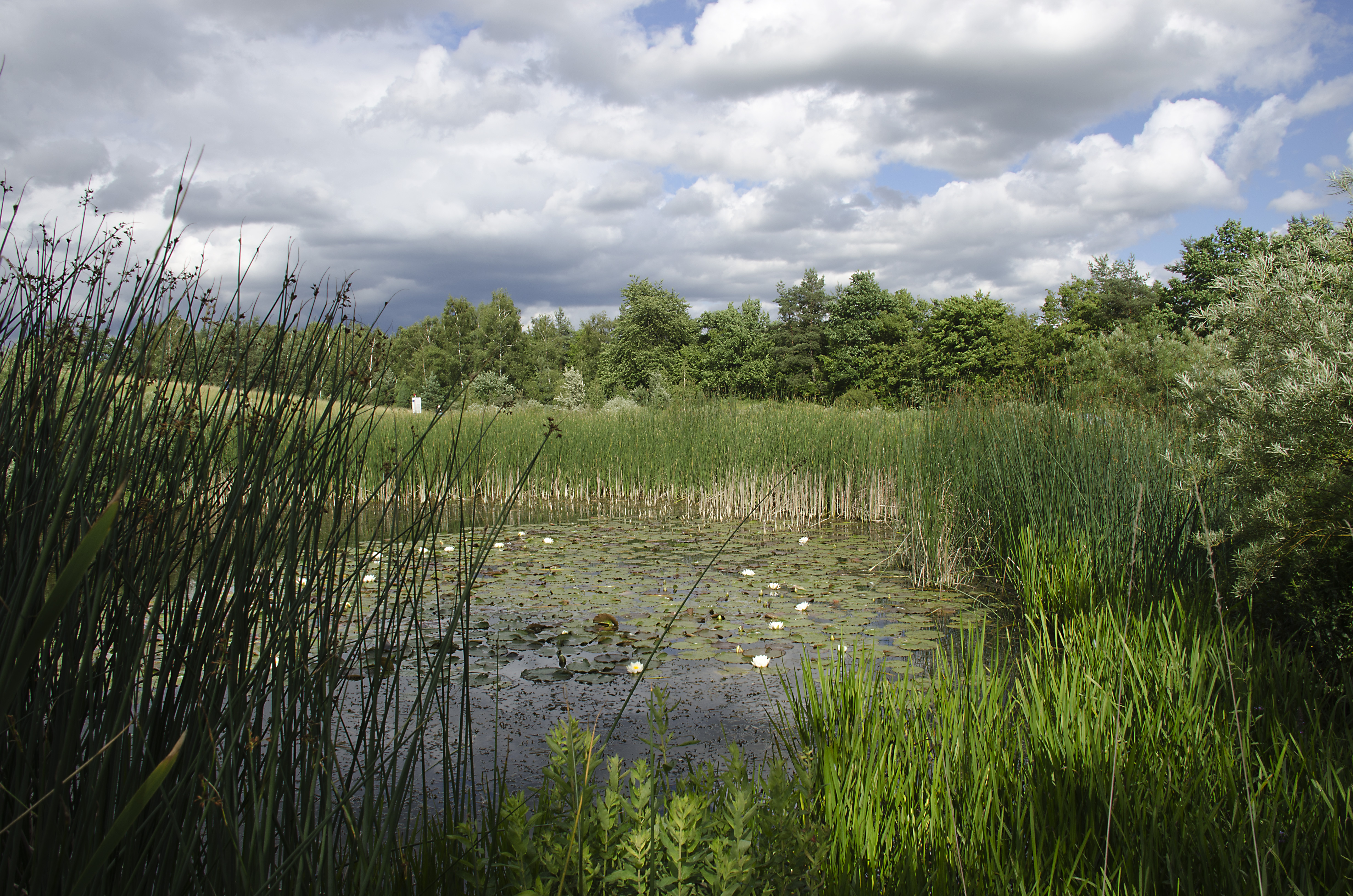 Botanischer Garten der Universität Hohenheim, Stuttgart